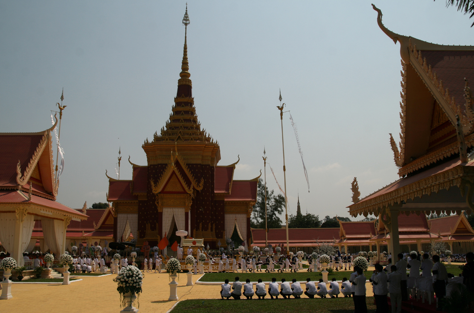 Ceremonie pour la cremation Norodom Sihanouk, roi du Cambodge